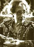 Excelente portavoz de la cultura afrocubana, convirtiéndose en una fiel rescatadora de todas las creencias y prácticas religiosas presentes en Cuba.